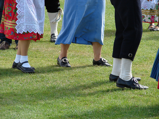 Dansk folkedans på Rømø, Kommandørgården